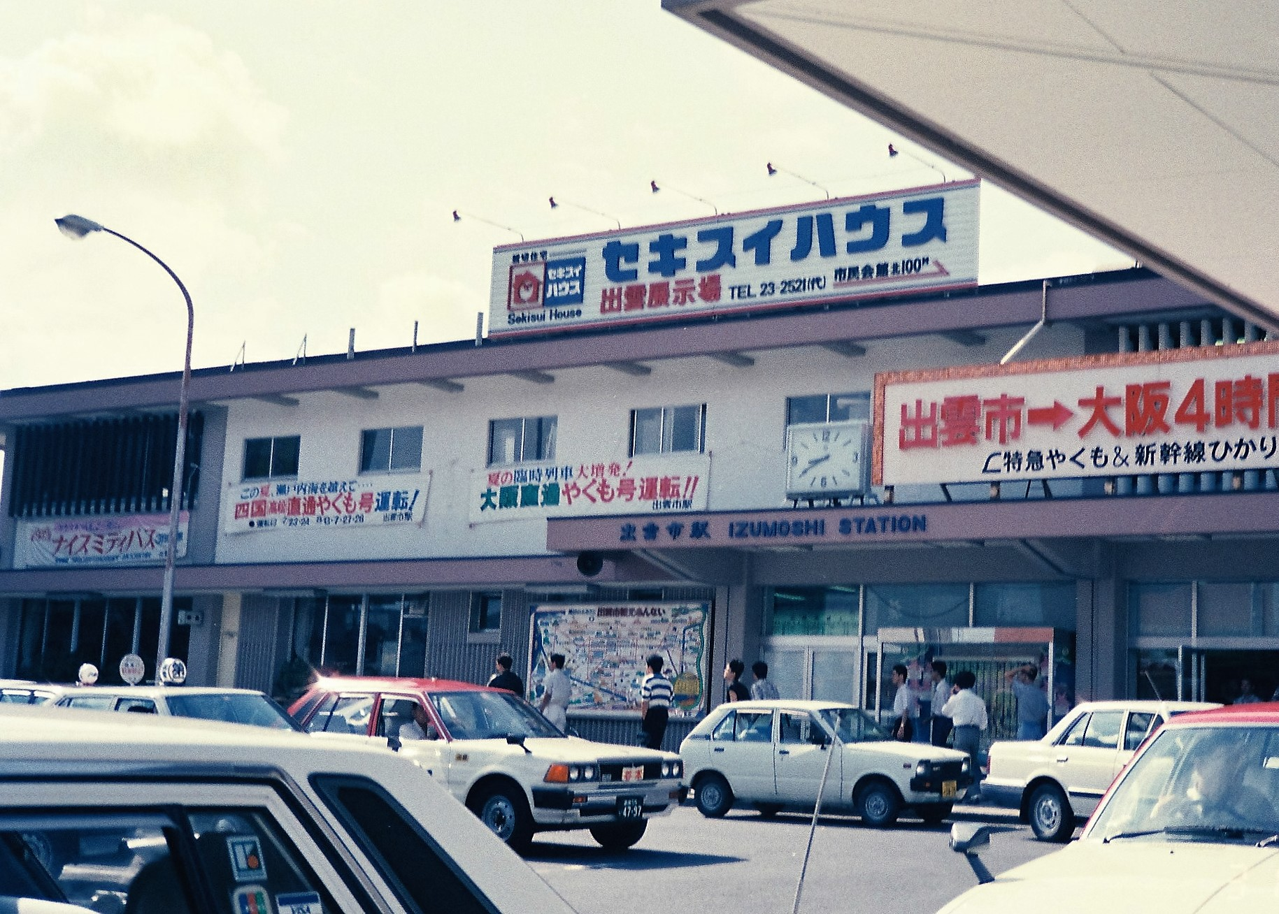 高架化前の出雲市駅舎（1988年7月）